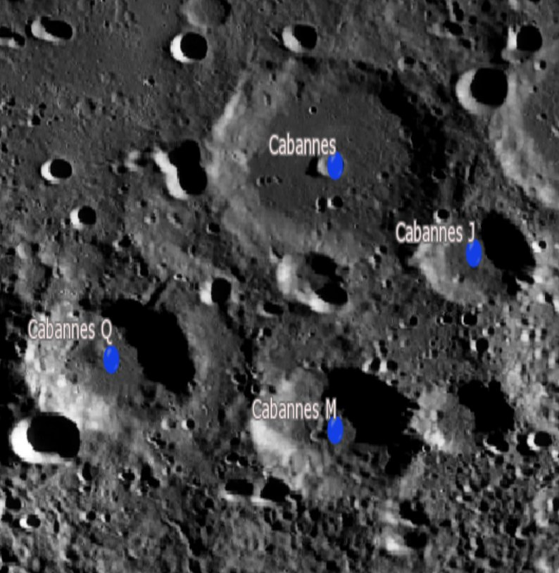 Cráter lunar Cabannes. Cráteres satélite. (Imagen LRO)